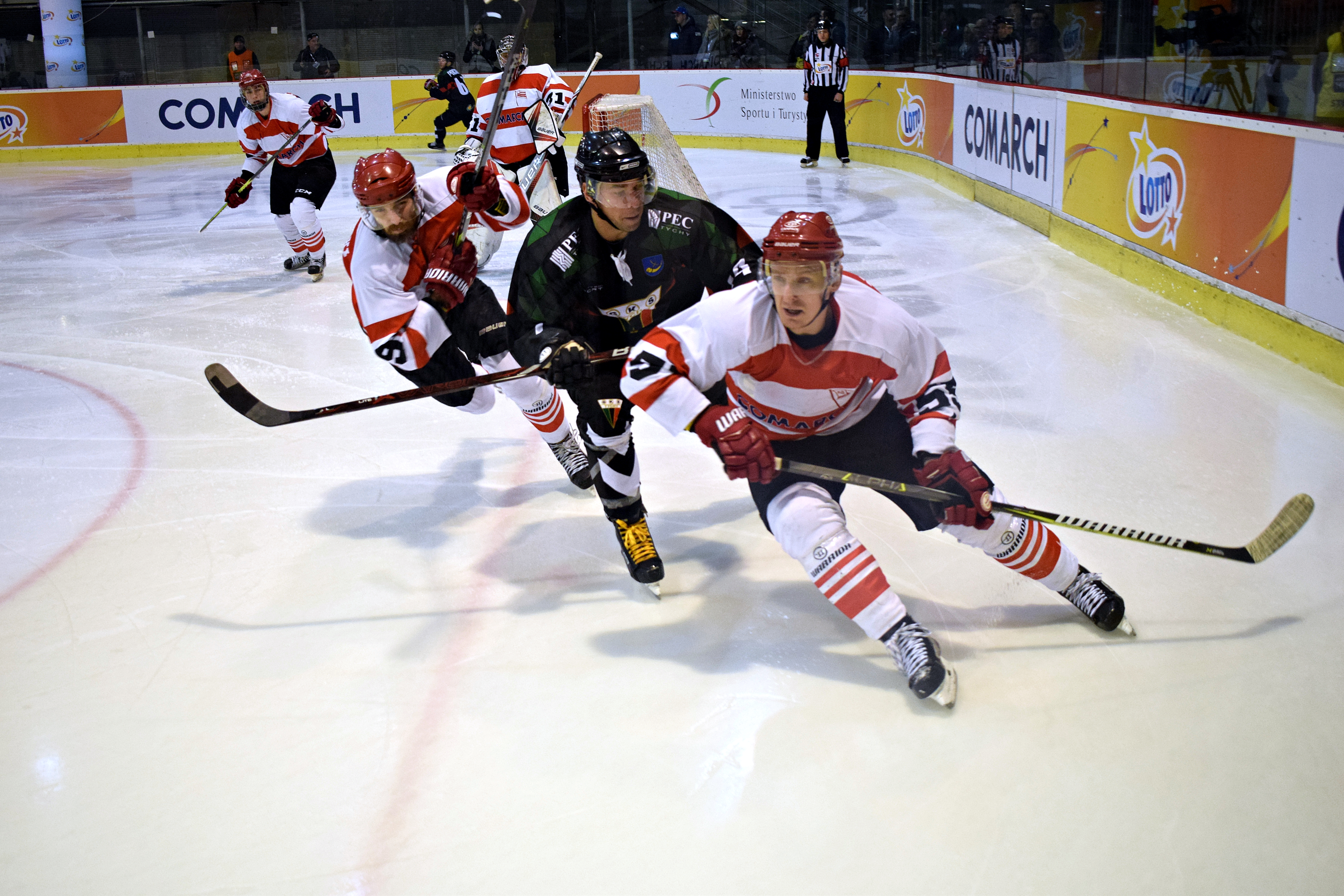 Kristofer Kolanos #74 (GKS Tychy) Patryk Noworyta #55 (Comarch Cracovia)